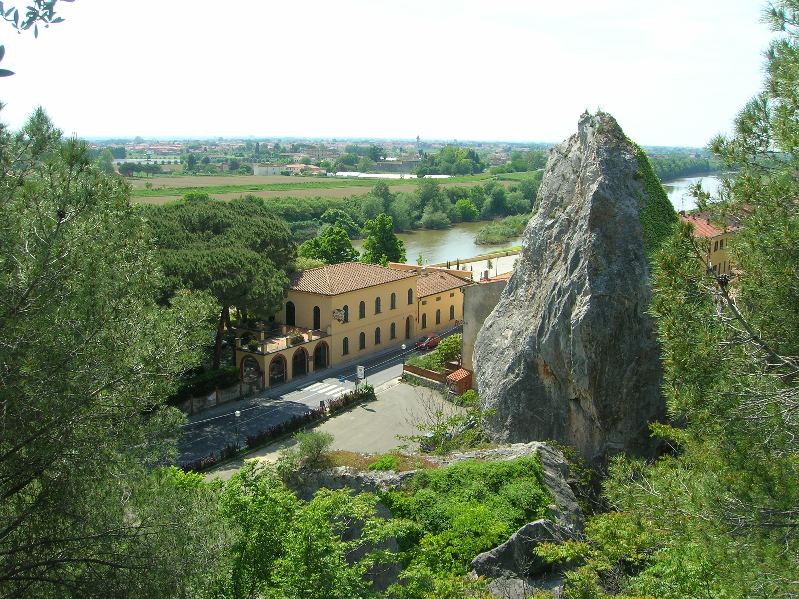 Veduta aerea delle Terme di Uliveto Terme